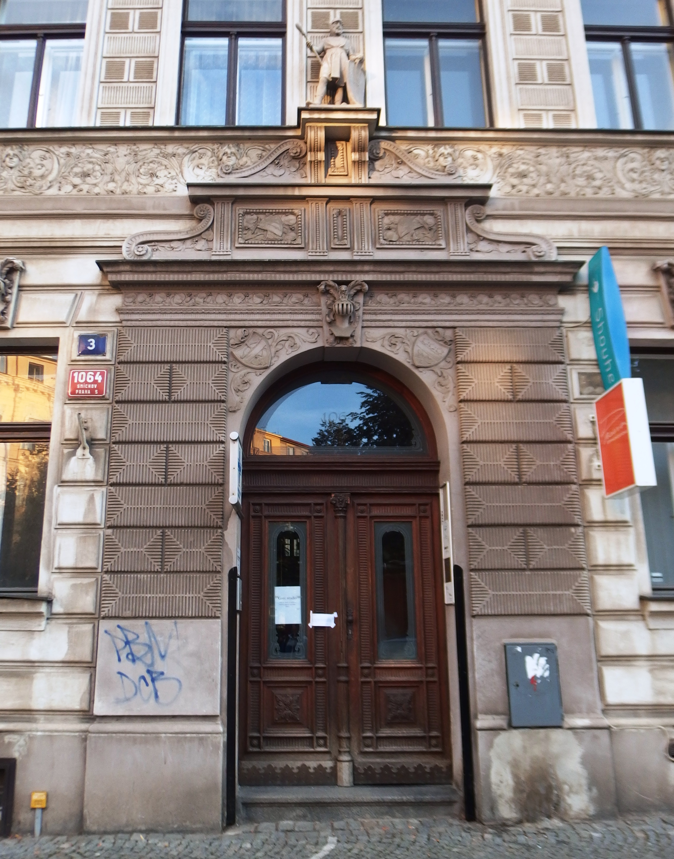 Arbesovo náměstí 3, Arbesovo náměstí 1064/3, Smíchov.